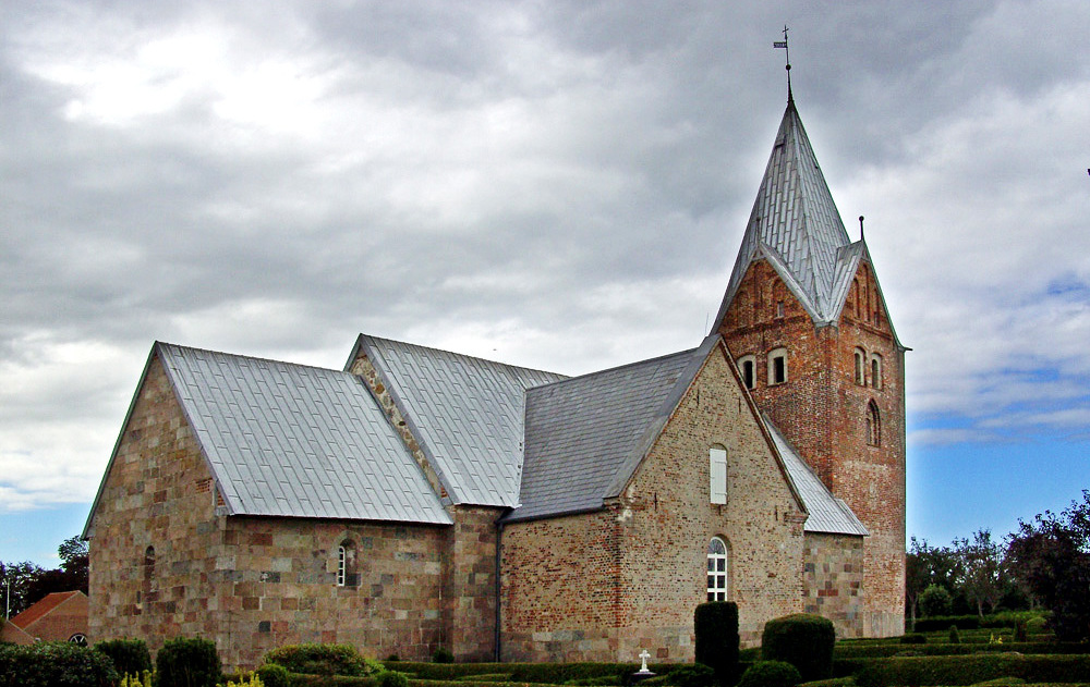 fra nordøst